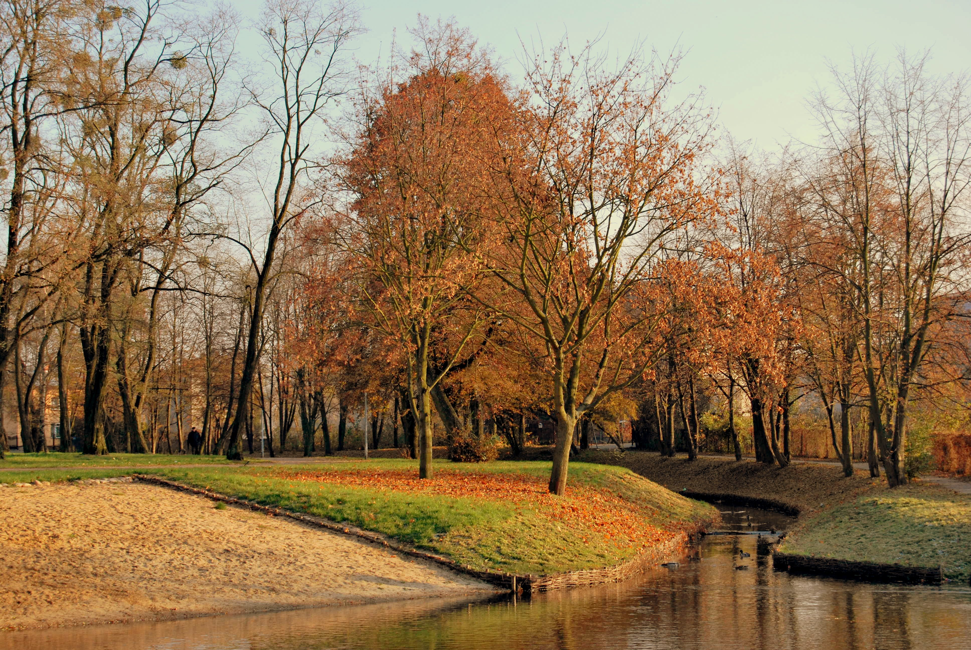 Park Bajka